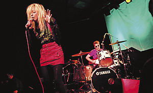 The Ting Tings le 4 avril 2008 à Soundhaus dans la ville de Northampton. Date 4 avril 2008 Auteur PMB